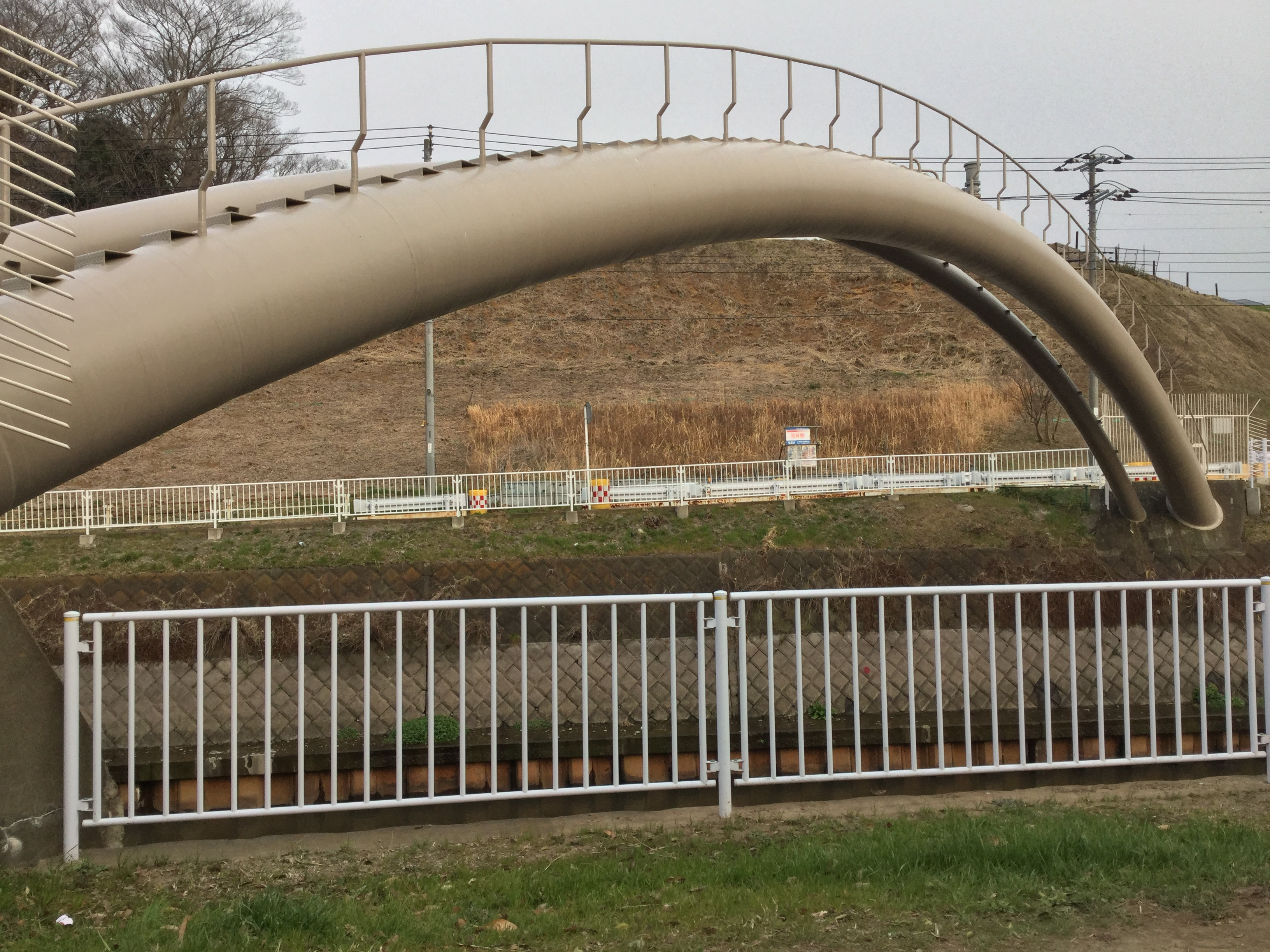 引地川にかかる横須賀水道管橋（神奈川県藤沢市円行）